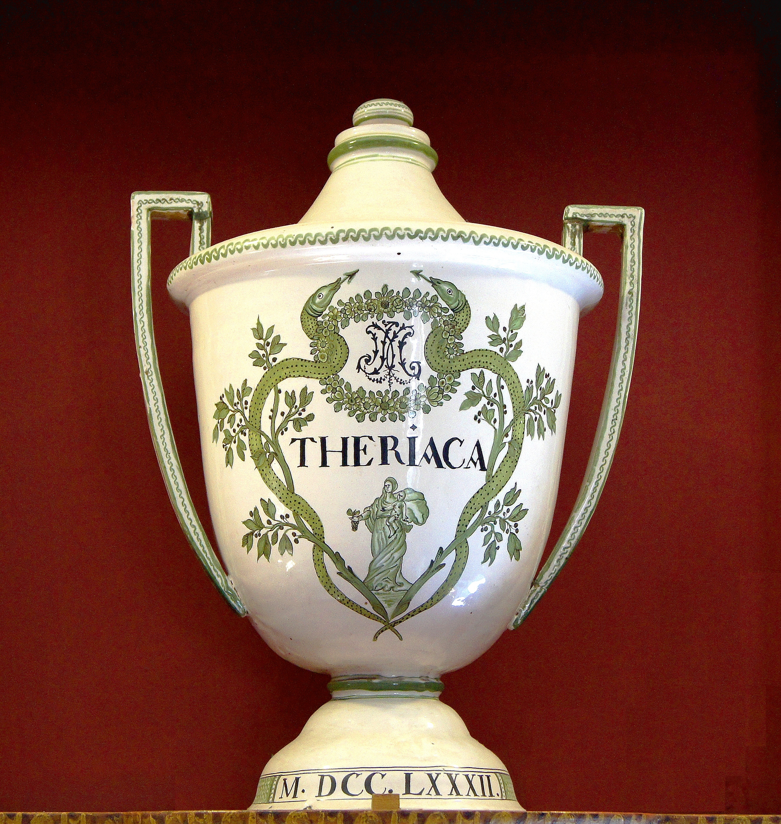 pot à pharmacie du XVIIIème siècle, Thériaque, Pharmacie des Hospices de Beaune, France.